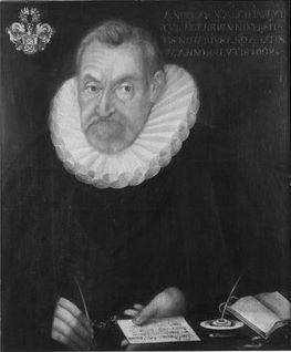 Ölgemälde in der Tübinger Professorengalerie